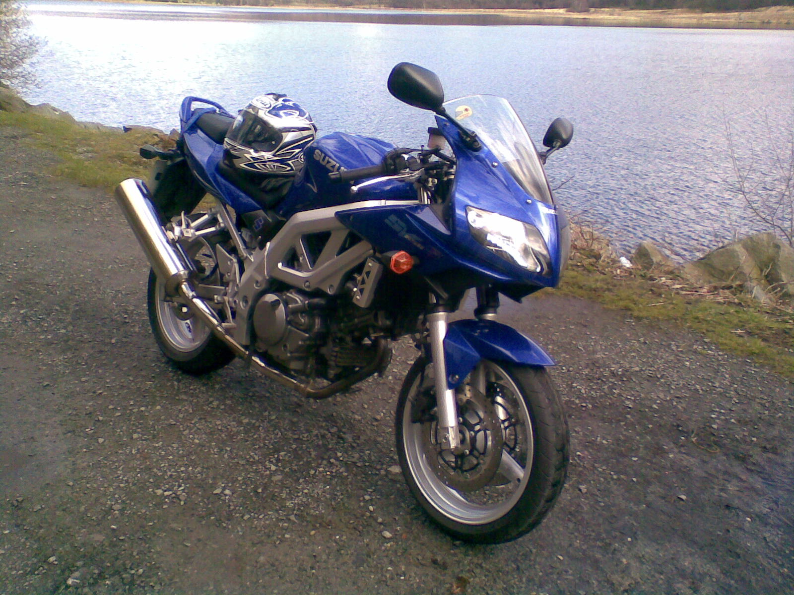 Suzuki SV650s K3